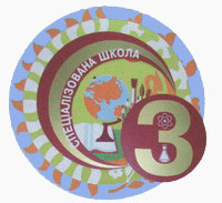 логотип